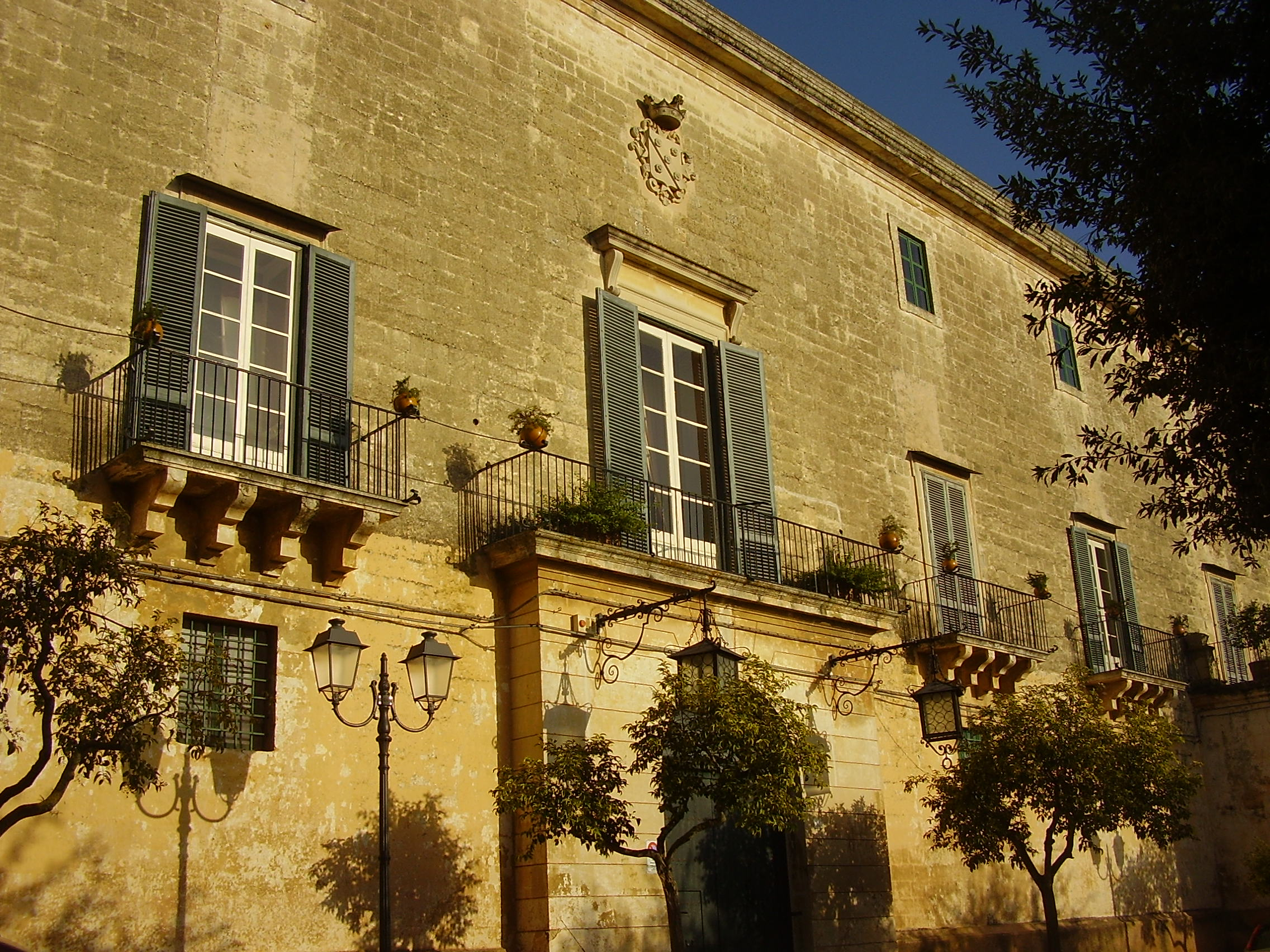 Palazzo Frisari Scorrano, Lecce